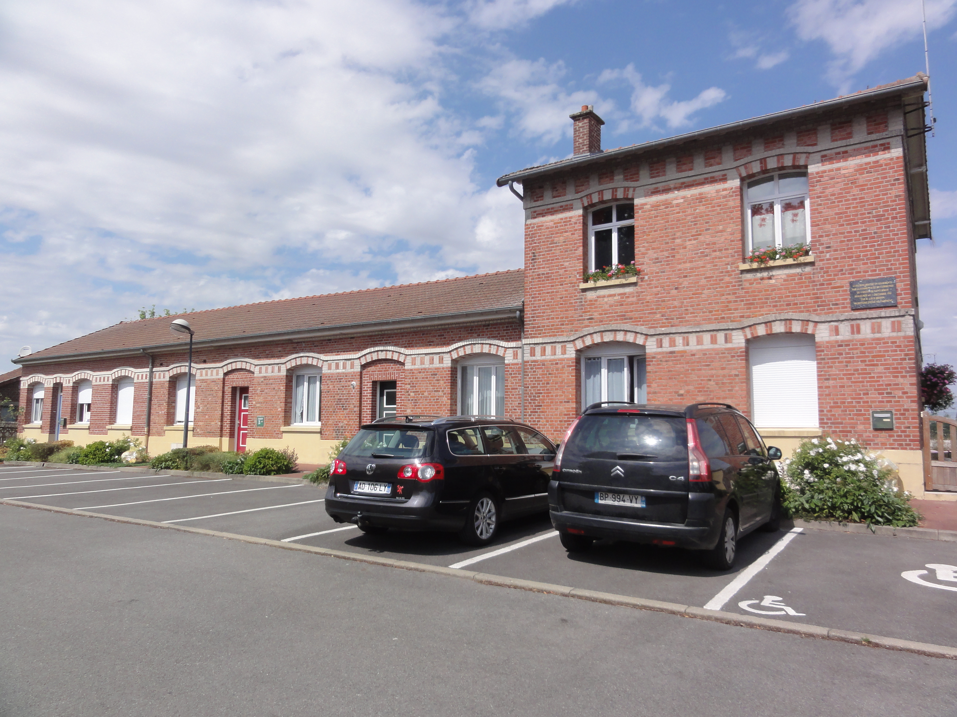 Flavy-le-Martel (Aisne) la gare réhabilitée